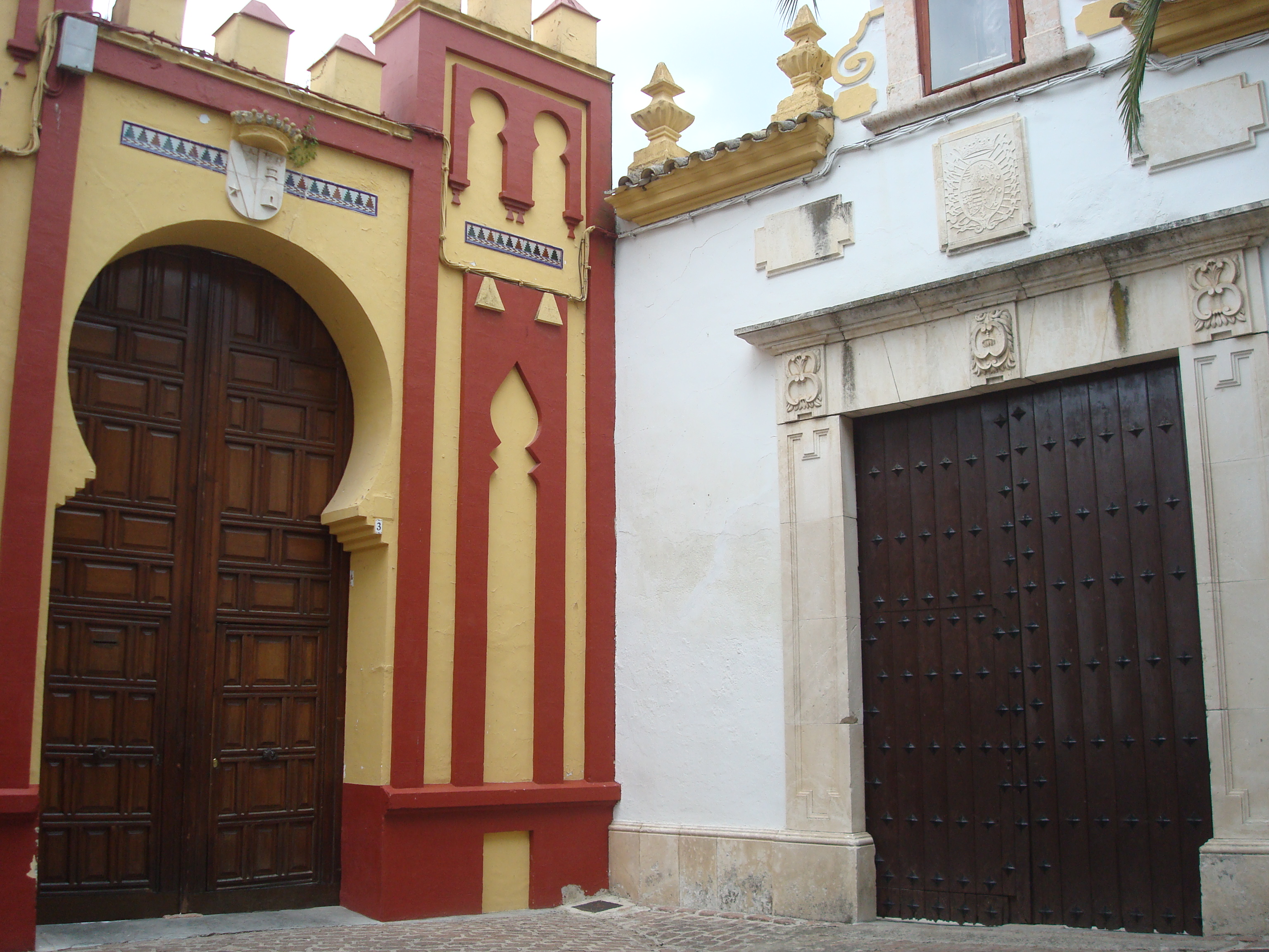 Cabra - 008